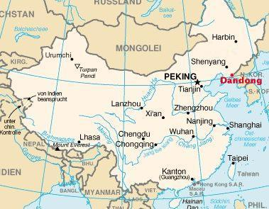 Lage der Stadt Dandong. Als Bild wurde von Bild:Changchun Lage.jpg genommen und der Punkt versetzt. CIA World Factbook